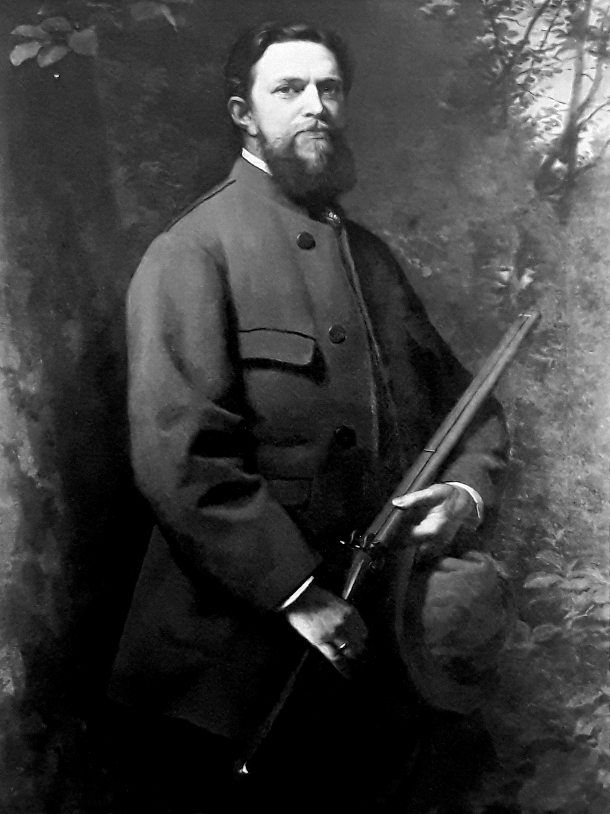 Portrait des Alexander von Pfuel (1825–1898), preußischer Ritterschaftsdirektor, Rechtsritter des Johanniterordens, Herr auf Jahnsfelde; portraitiert (1870) von Oskar Begas (1828-1883)